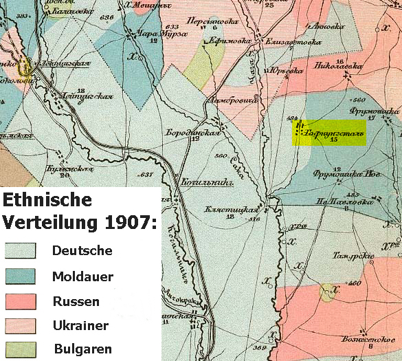 Ethnische Verteilung in Bessarabien 1907 bei Hoffnungstal